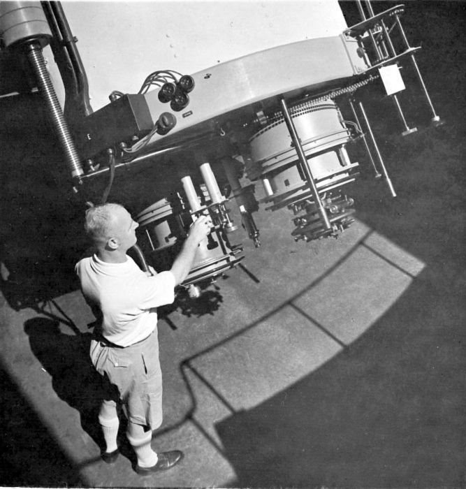 Repronegatief. Medewerker van de sterrenwacht te Lembang bij een telescoop